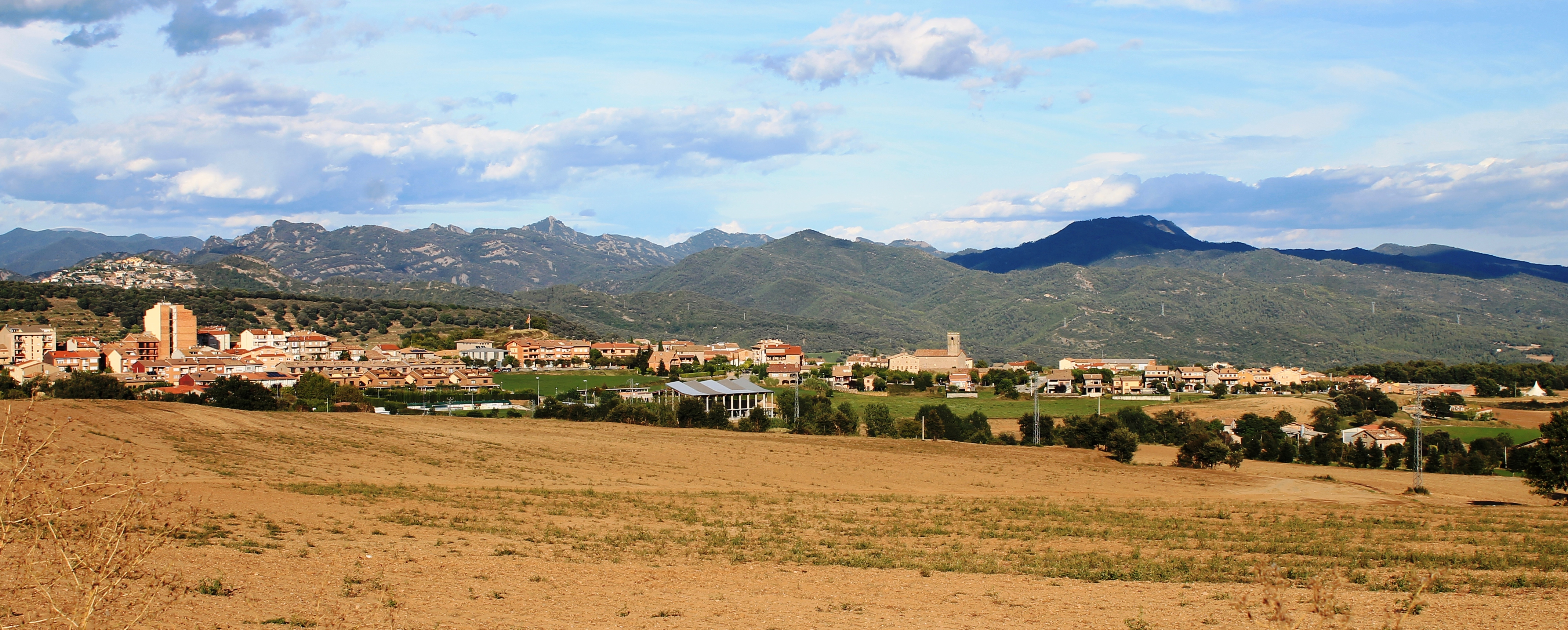 Vista d'Avià (des de la carretera de l'Espunyola)